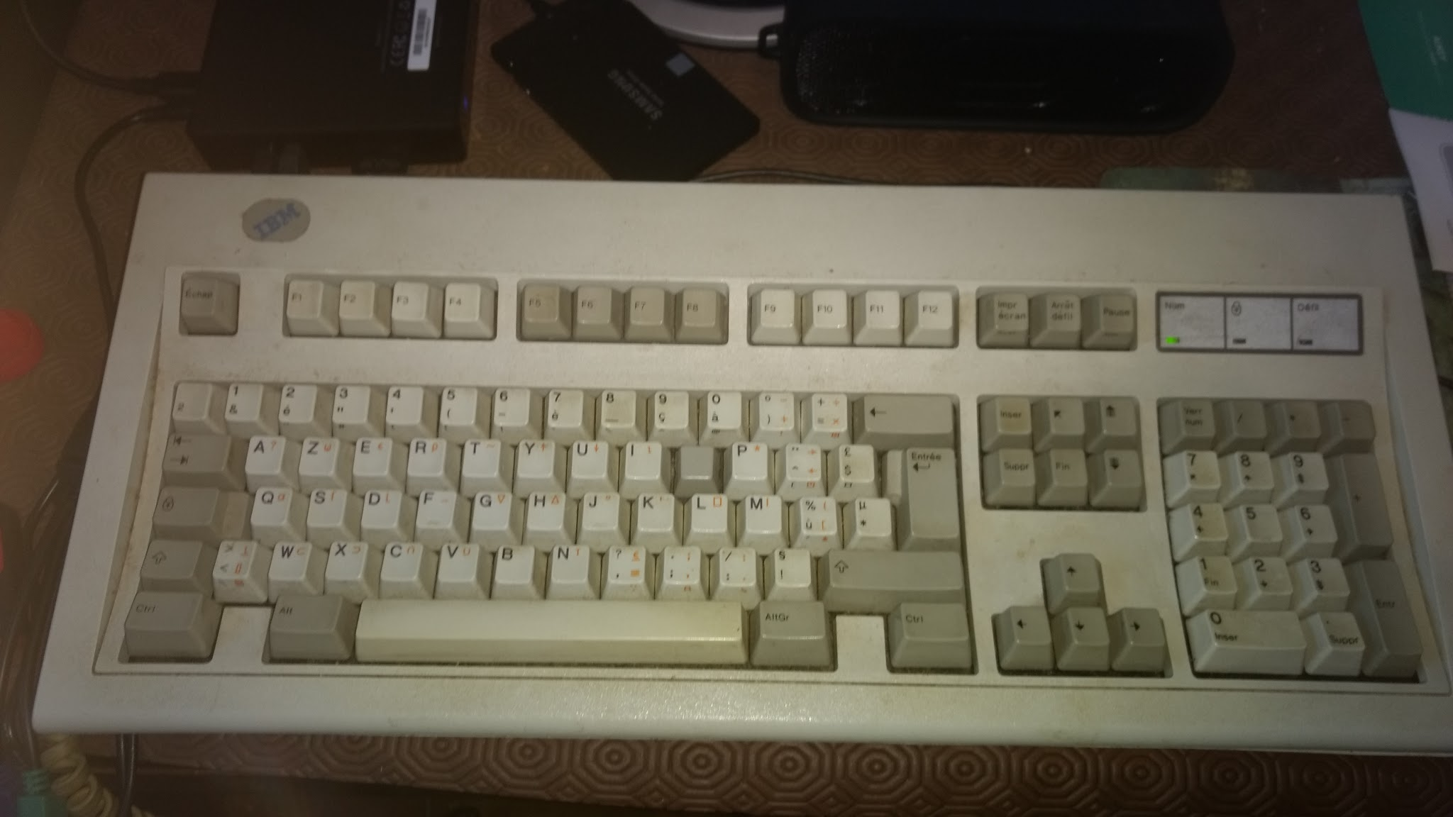 Clavier M d'IBM, version française pour la Wikipédia française, version équipée de capots de touches APL. Fabrication IBM UK, S/N 1391402, sorti d'usine le 10/7/1995